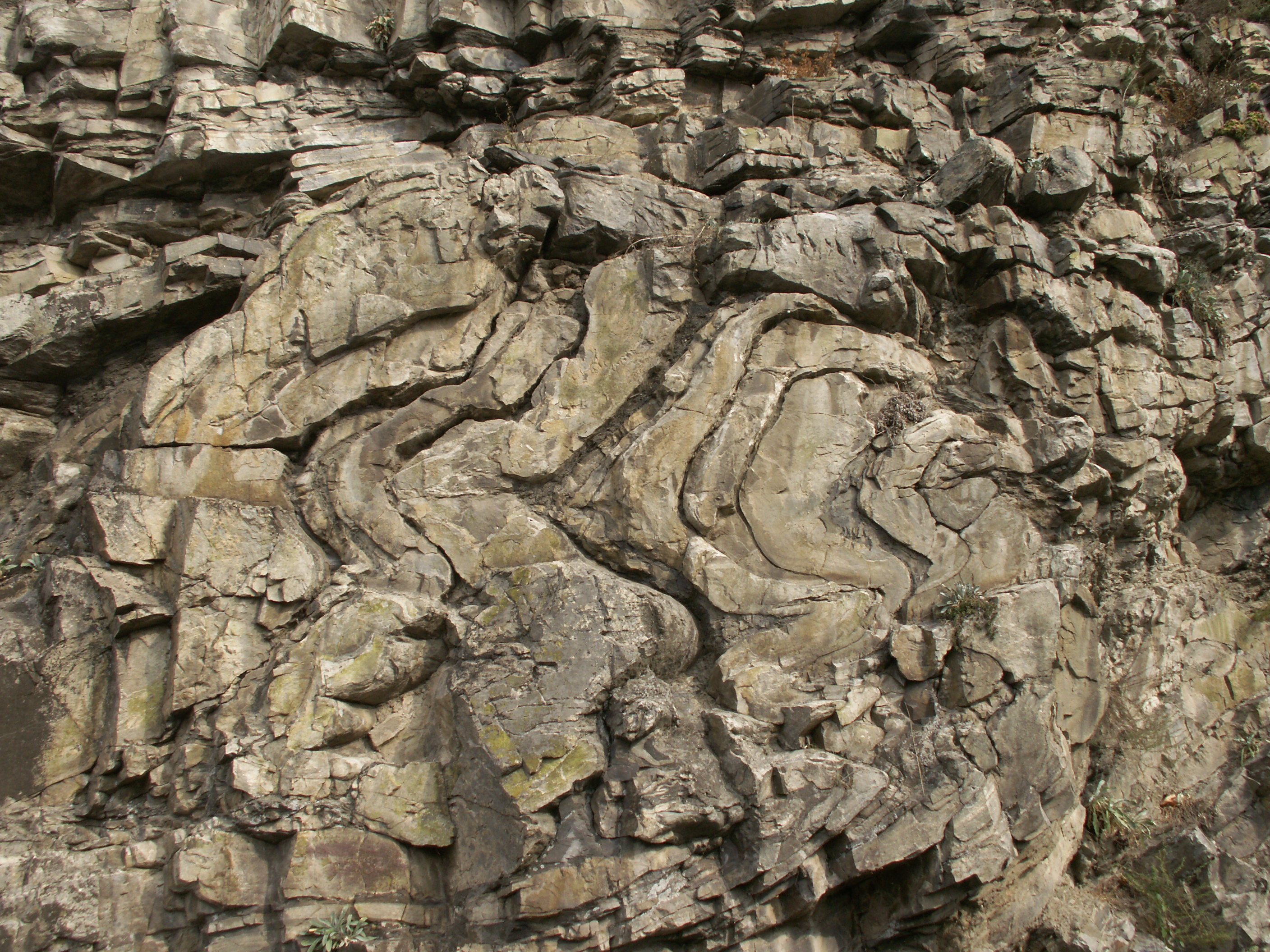 vrásy v bítešských ortorulách, Zadní Hamry, obec Vranov nad Dyjí, okres Znojmo